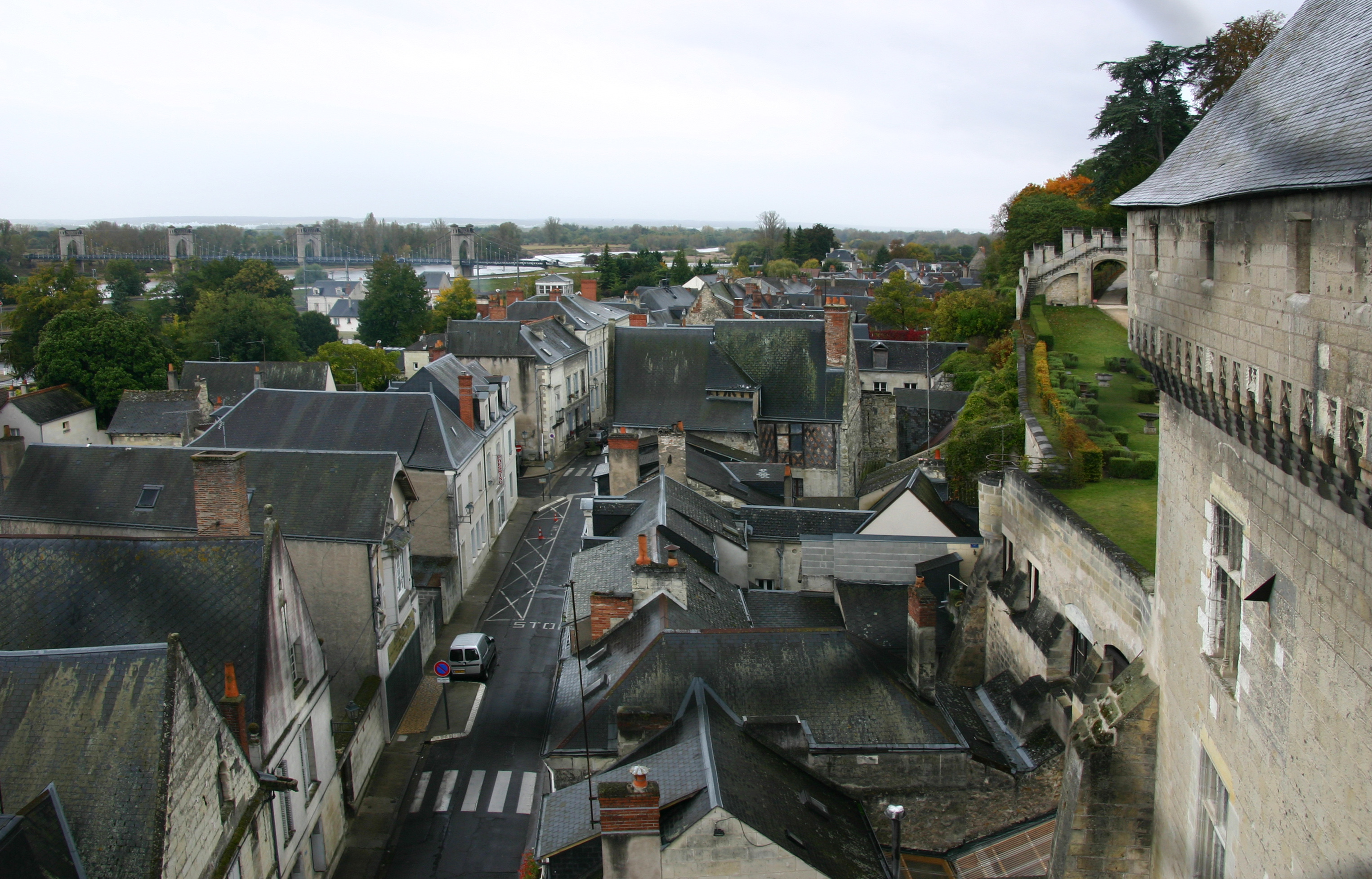 Langeais